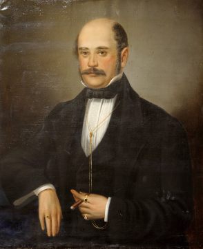 Semmelweis Ignác